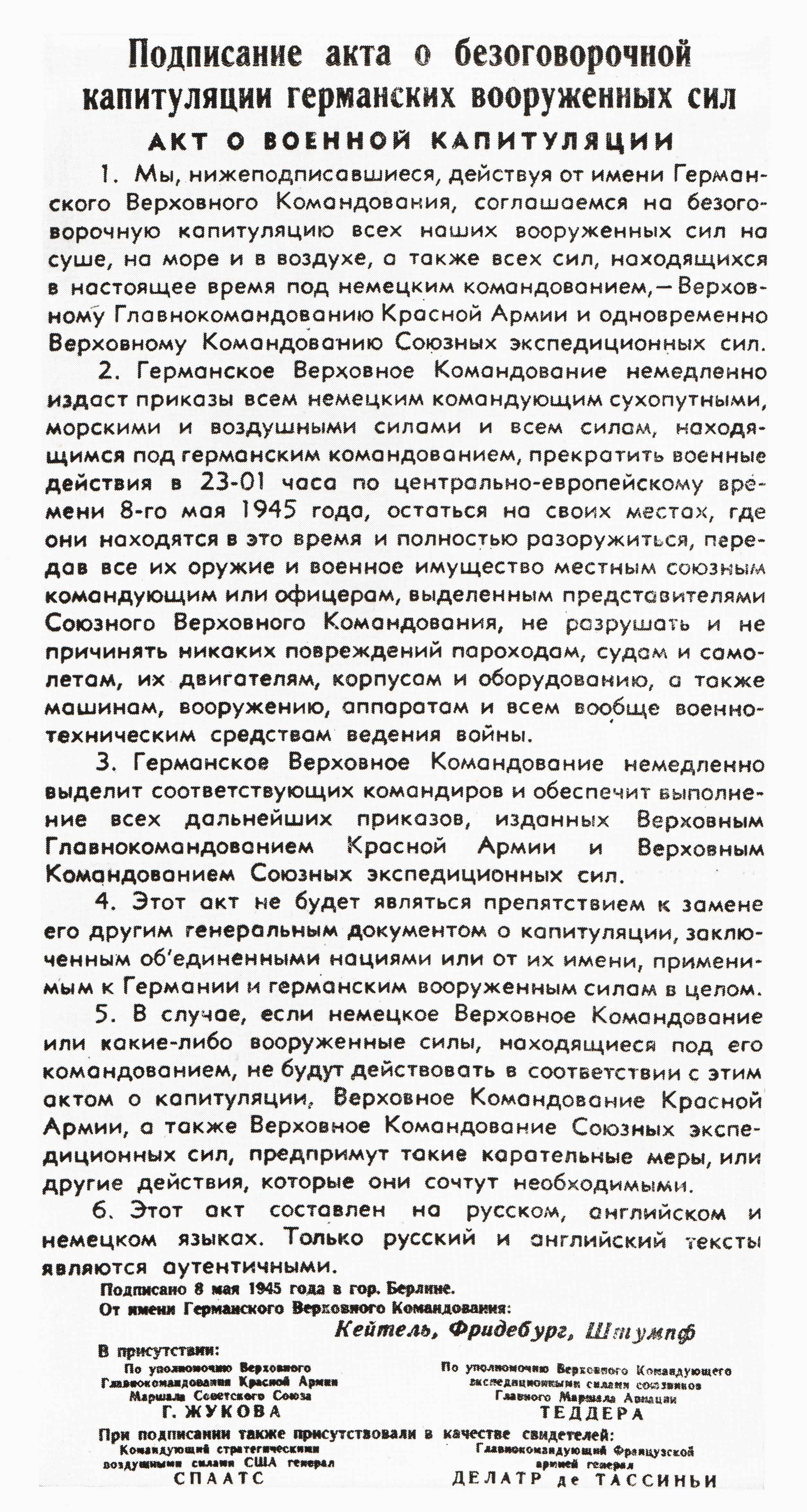 Акт о военной капитуляции Германии. 8 мая 1945. Опубликован на 1-й странице газеты "Правда" от 9 мая.